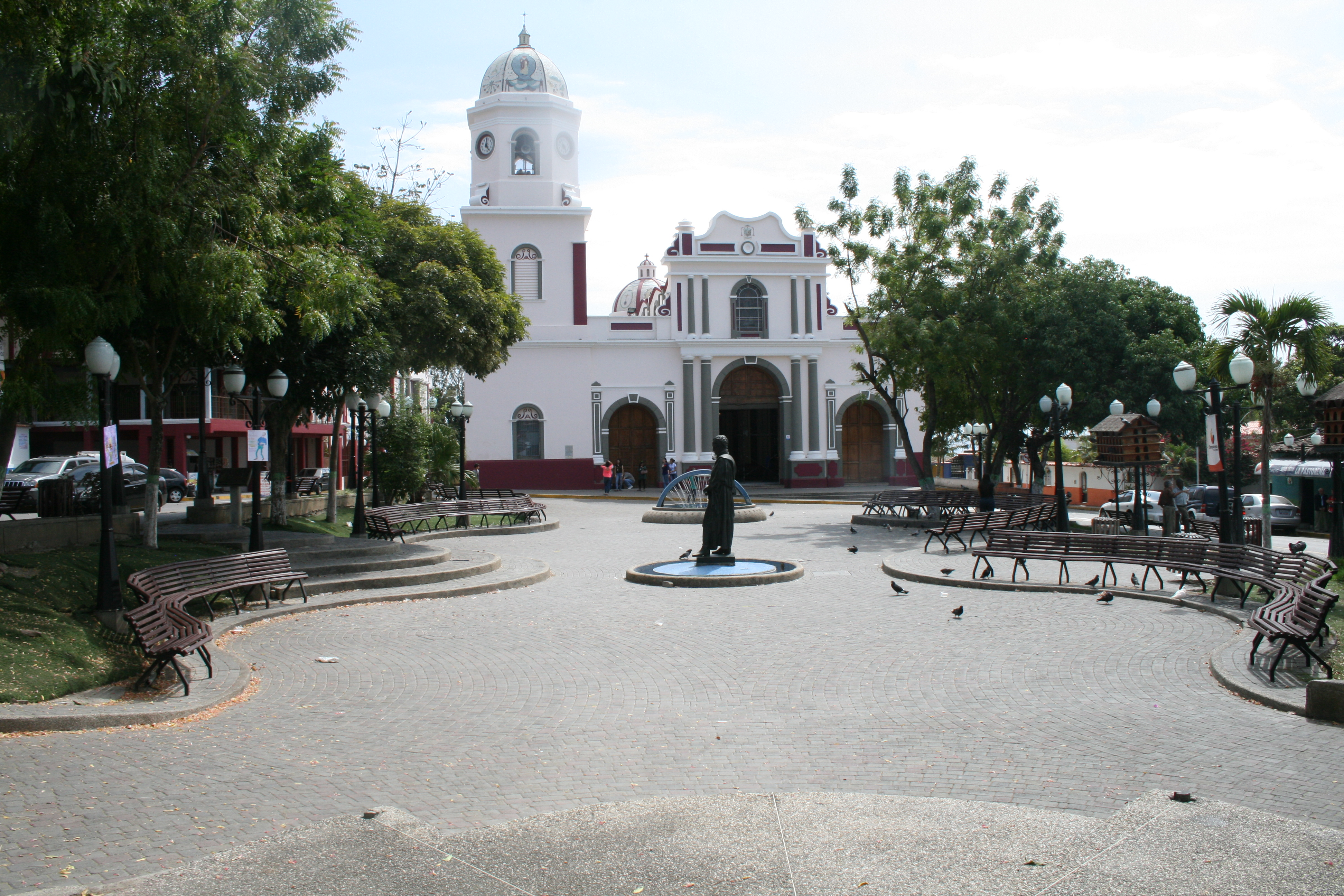 Plaza Bolivar de Santa Rosa